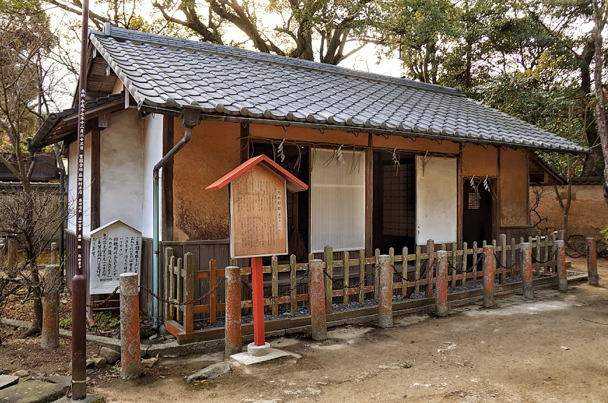 乃木神社（山口県下関市）にある乃木希典の家